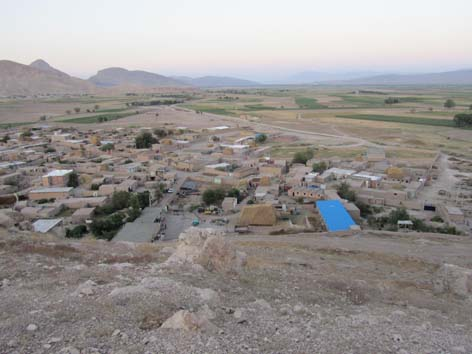 نمایی از بخش غربی روستای قزقلعه